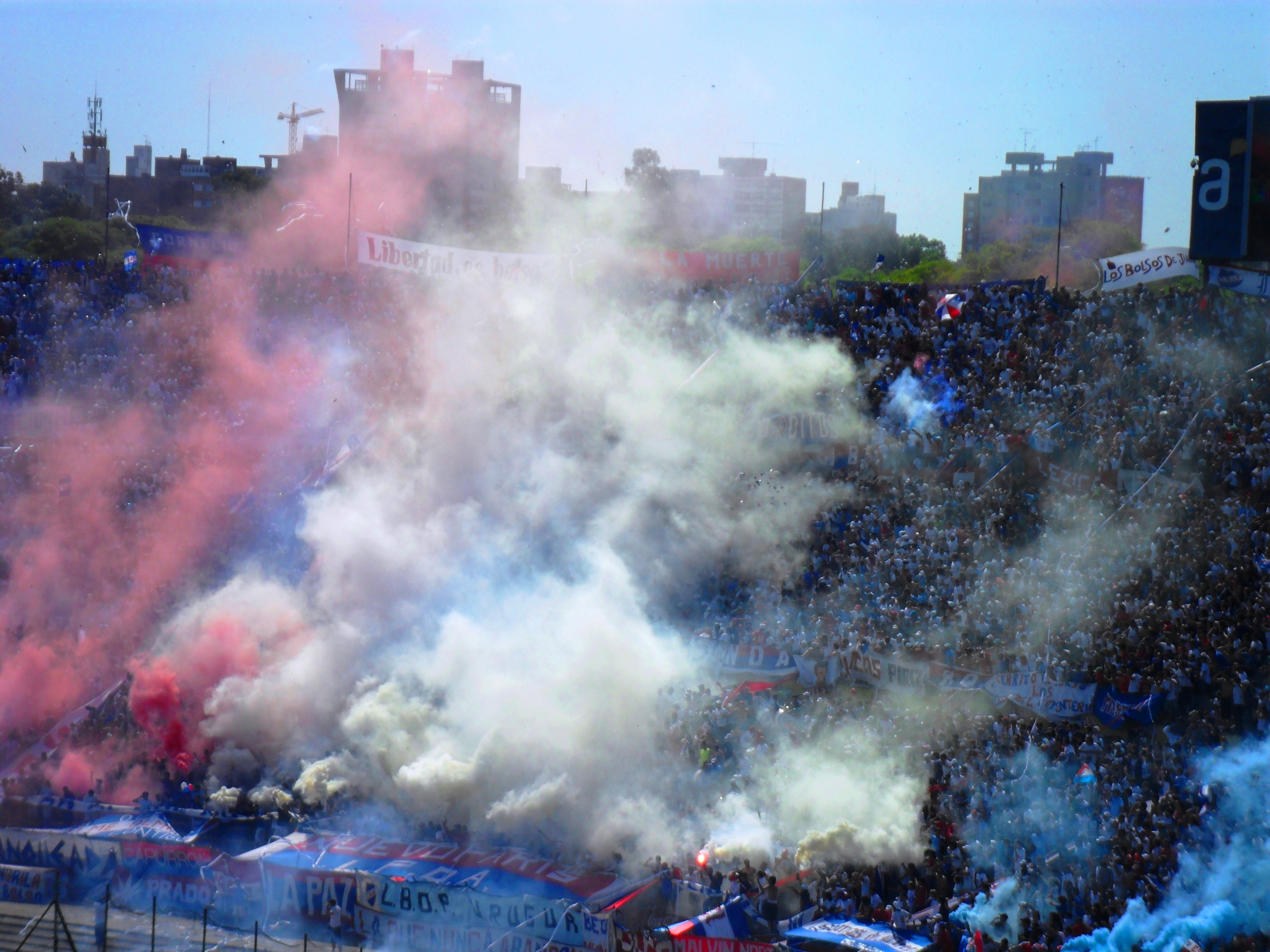 La Banda del Parque con humos tricolores. Imagen de la previa de un partido por el Campeonato Uruguayo, entre Nacional y Liverpool.